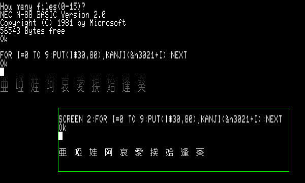 NEC N-88 Basic 2.0 PUT関数で漢字を表示